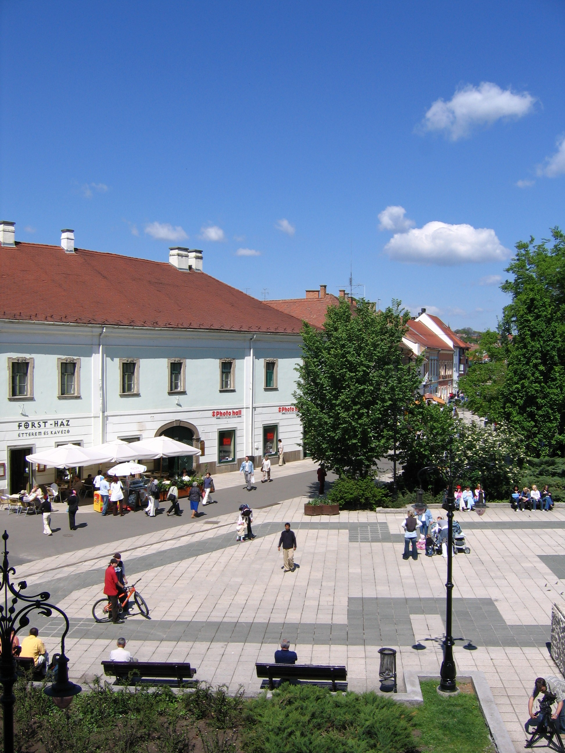 Dobó Square Eger, Hungary